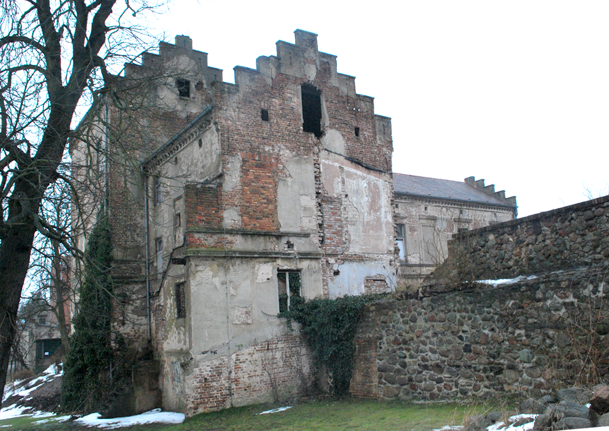 Bischofsschloss Fürstenwalde vor Beginn der Sanierung